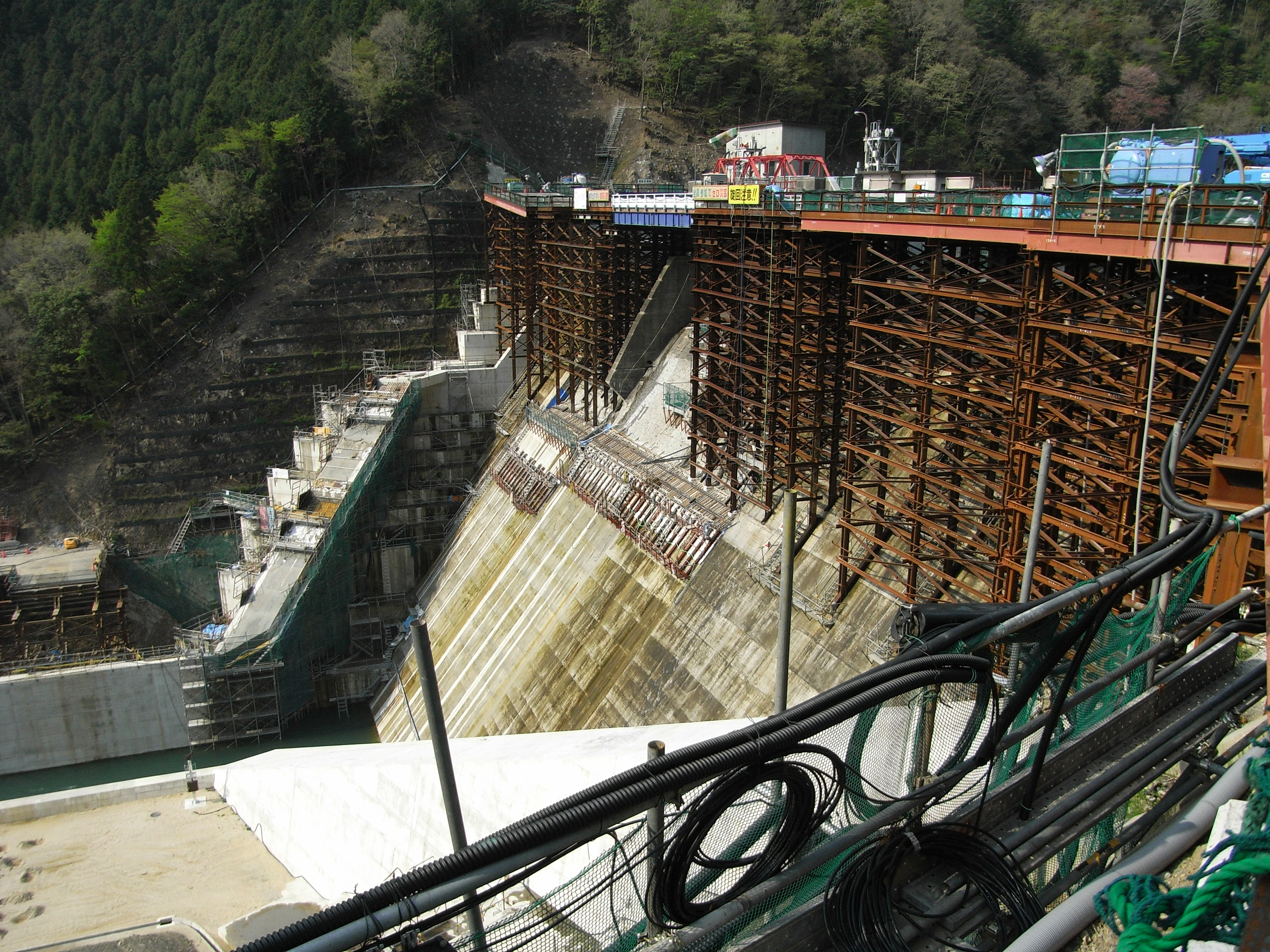 野洲川ダム （滋賀県・淀川水系野洲川。農林水産省近畿農政局） Yasugawa dam (Yasu river, Siga Pref., Japan) Ricoh Caplio R6